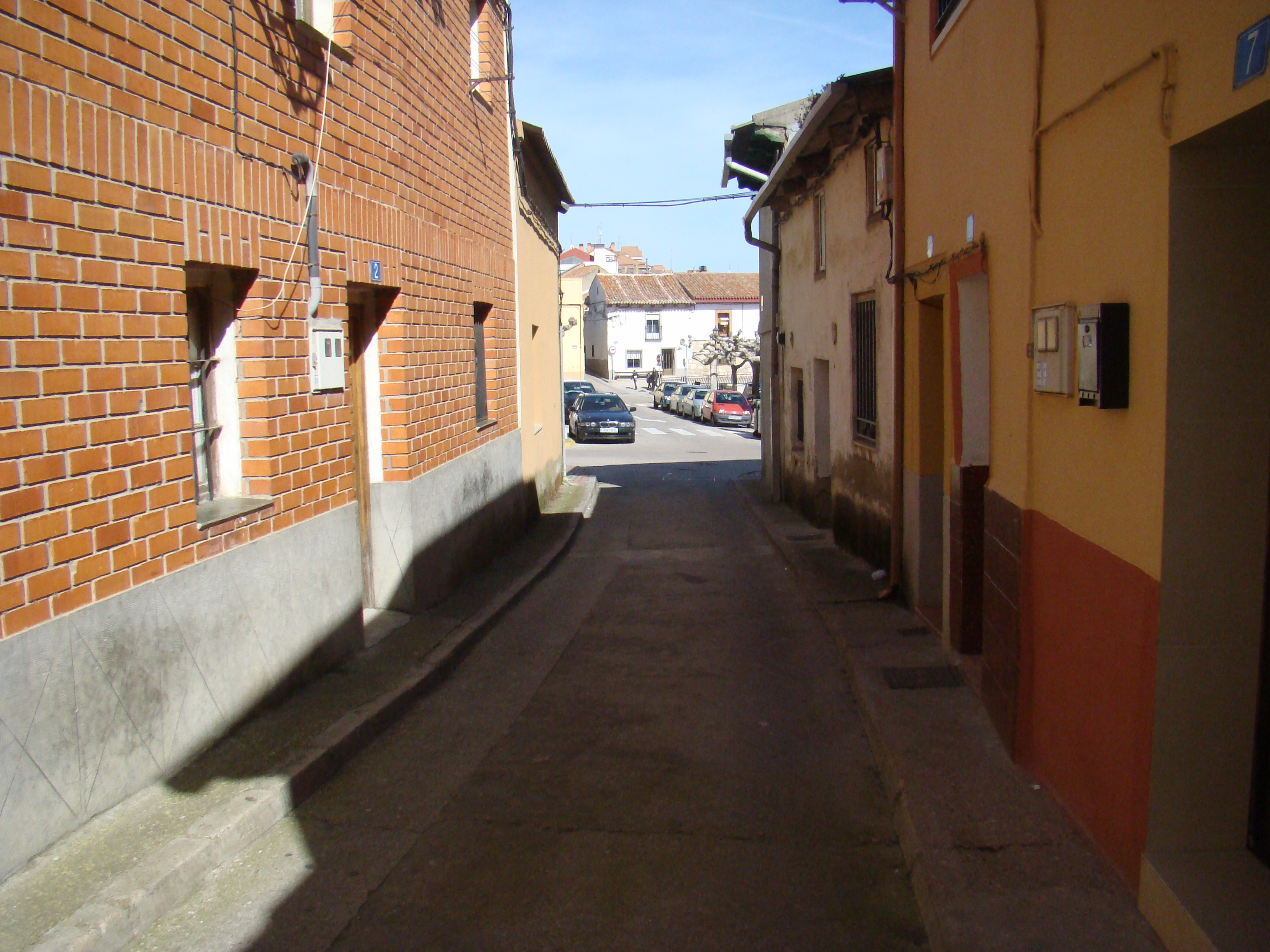 Zaratán, Valladolid (España). Calle del Pozo.